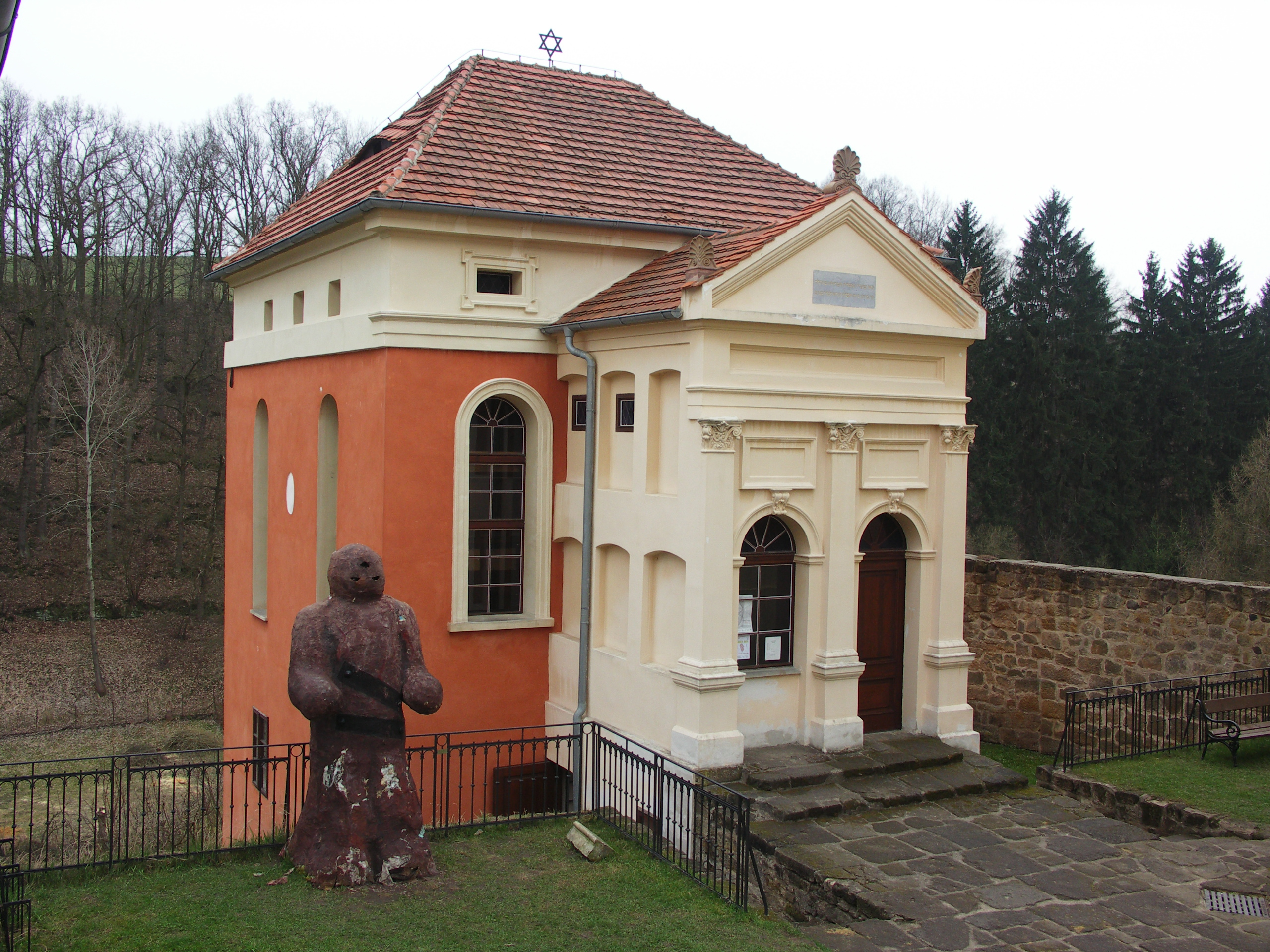 Synagoga (Úštěk), Úštěk 95